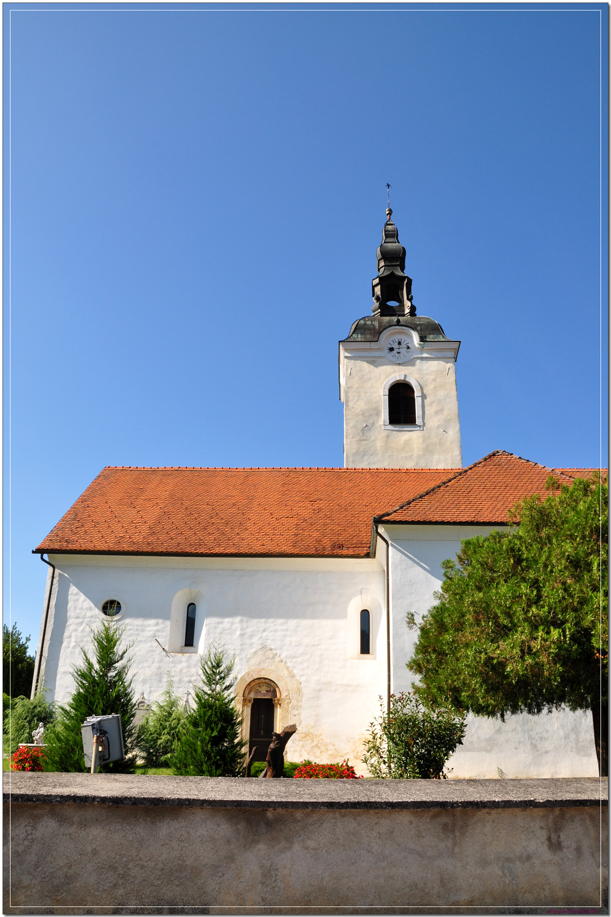 Kostanjevica (18)